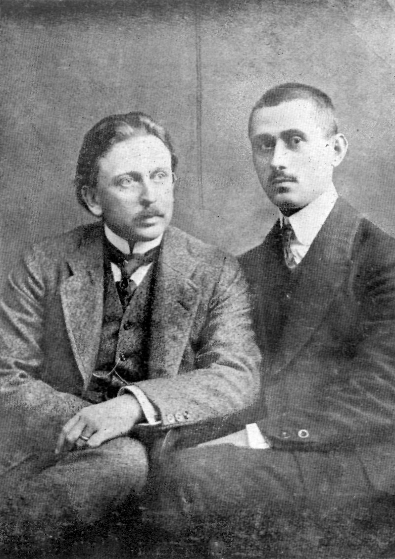 Aurel Vlaicu si Octavian Goga